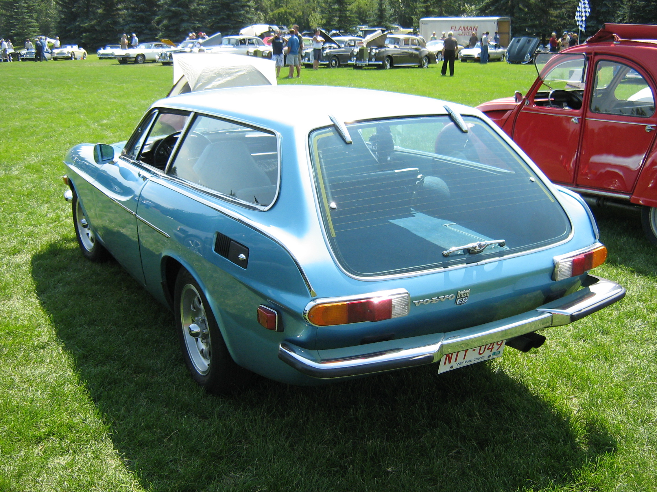 1973 Volvo P1800ES